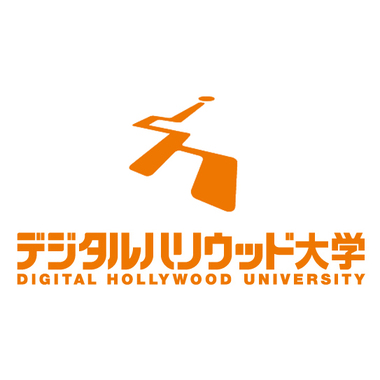 디지털 할리우드 대학교의 로고